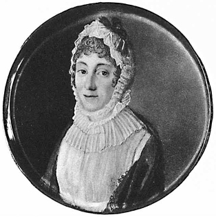 Grafinia Anna Loginovna Lamzdorf, 1762–1835